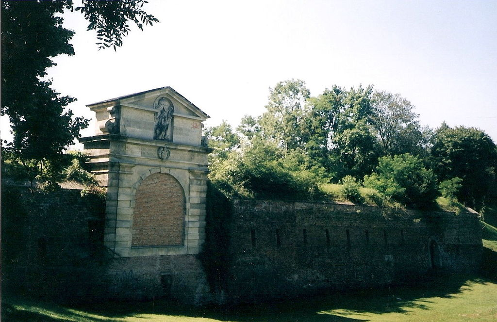 Stara Brama Lubelska w Zamościu